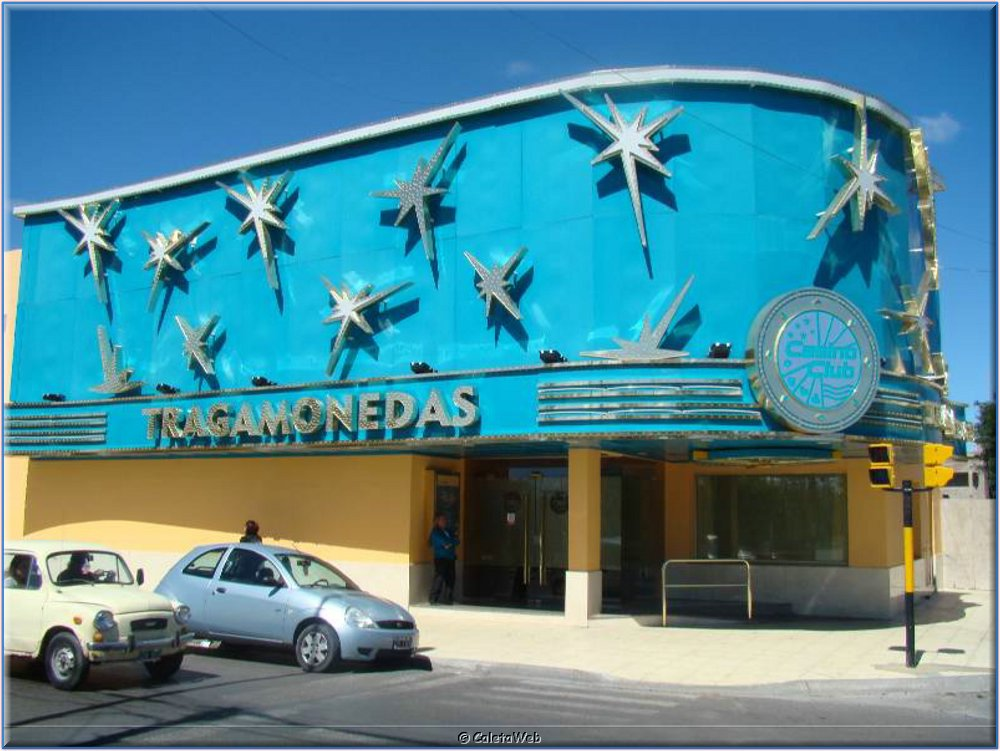 Tragamonedas